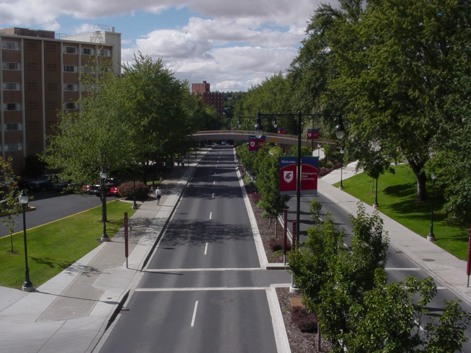 Stadium Way